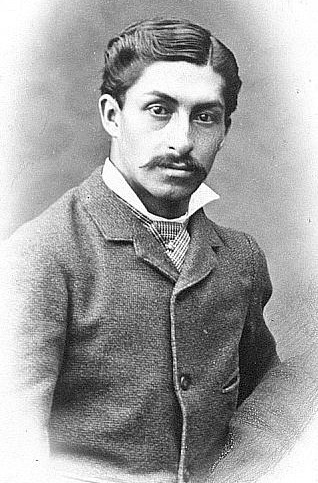 Carrión García, Daniel Alcides